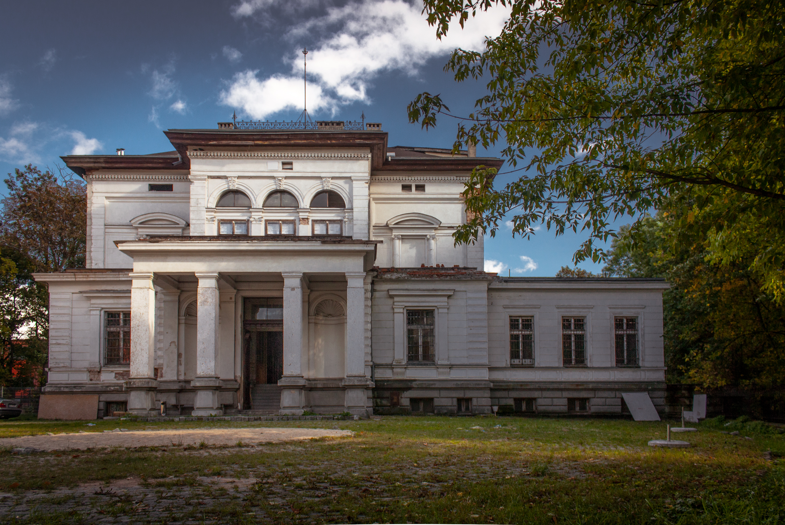 Łódź, willa Ludwika Grohmana, 1881, 1894